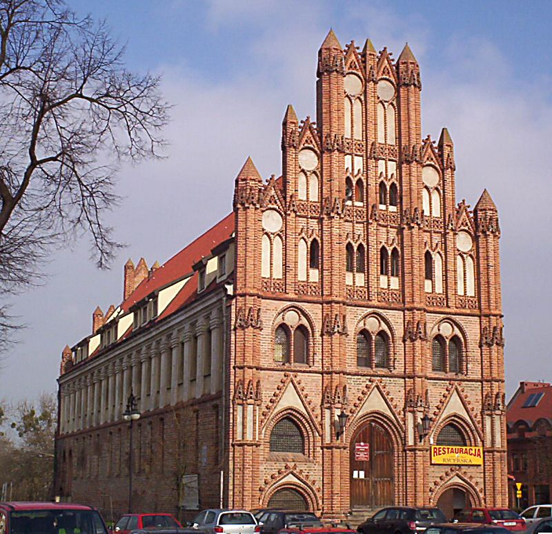 Chojna - dawny ratusz